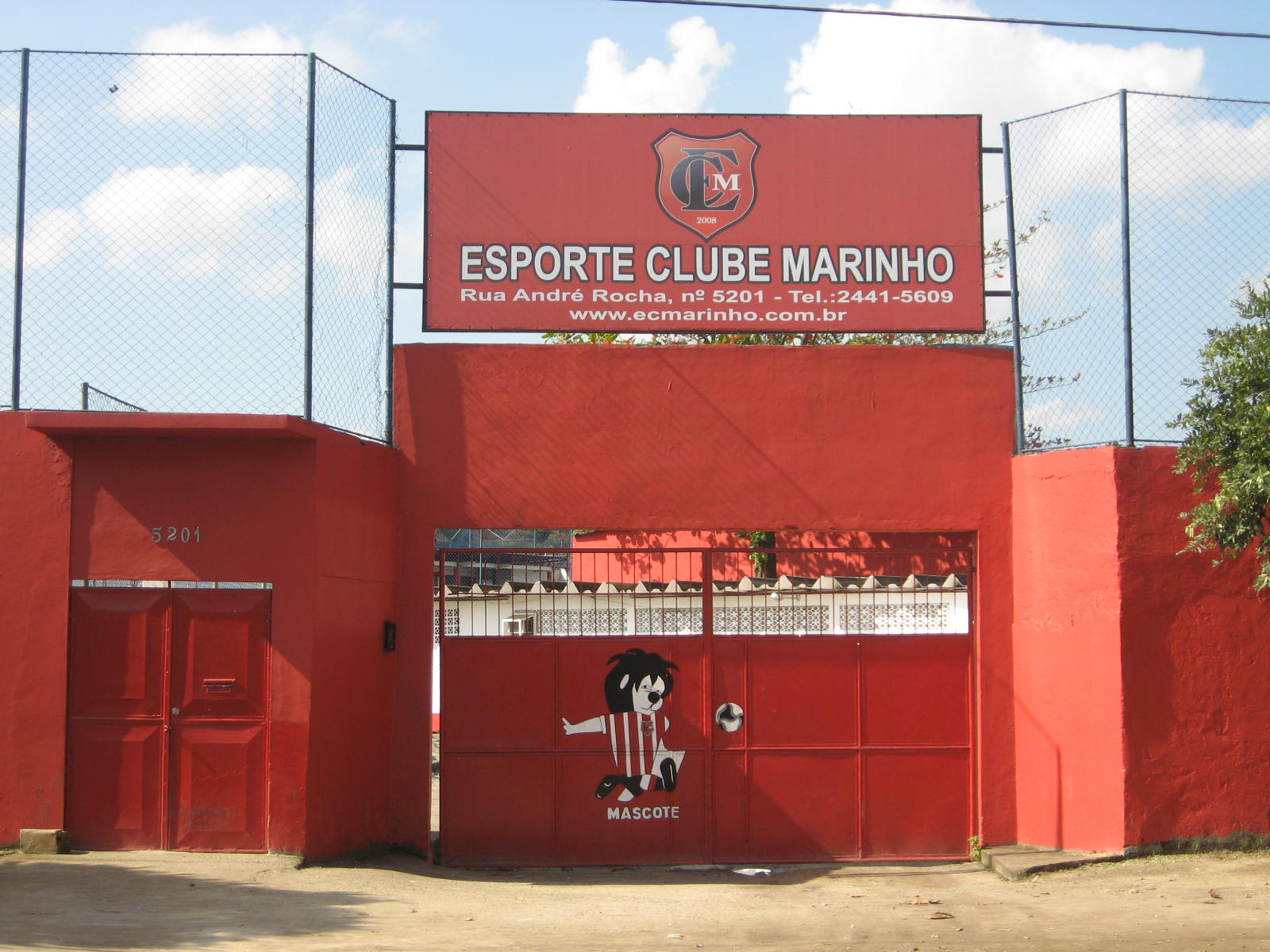 Vista da entrada do estádio Eustáquio Marques, em Curicica, Rio de Janeiro.